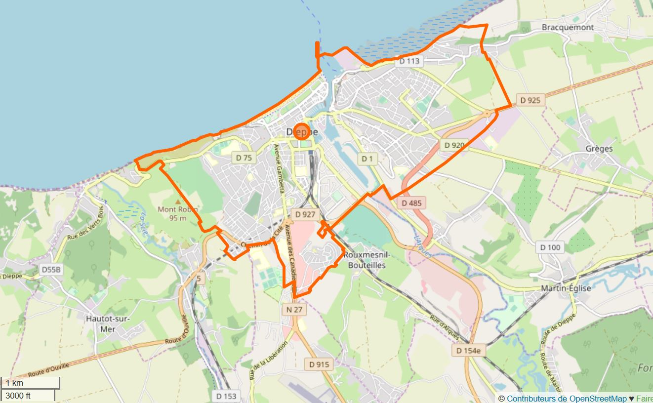 Cette carte a été créée à partir des données du projet openstreetmap. This map may be incomplete, and may contain errors. Don't rely solely on it for navigation.